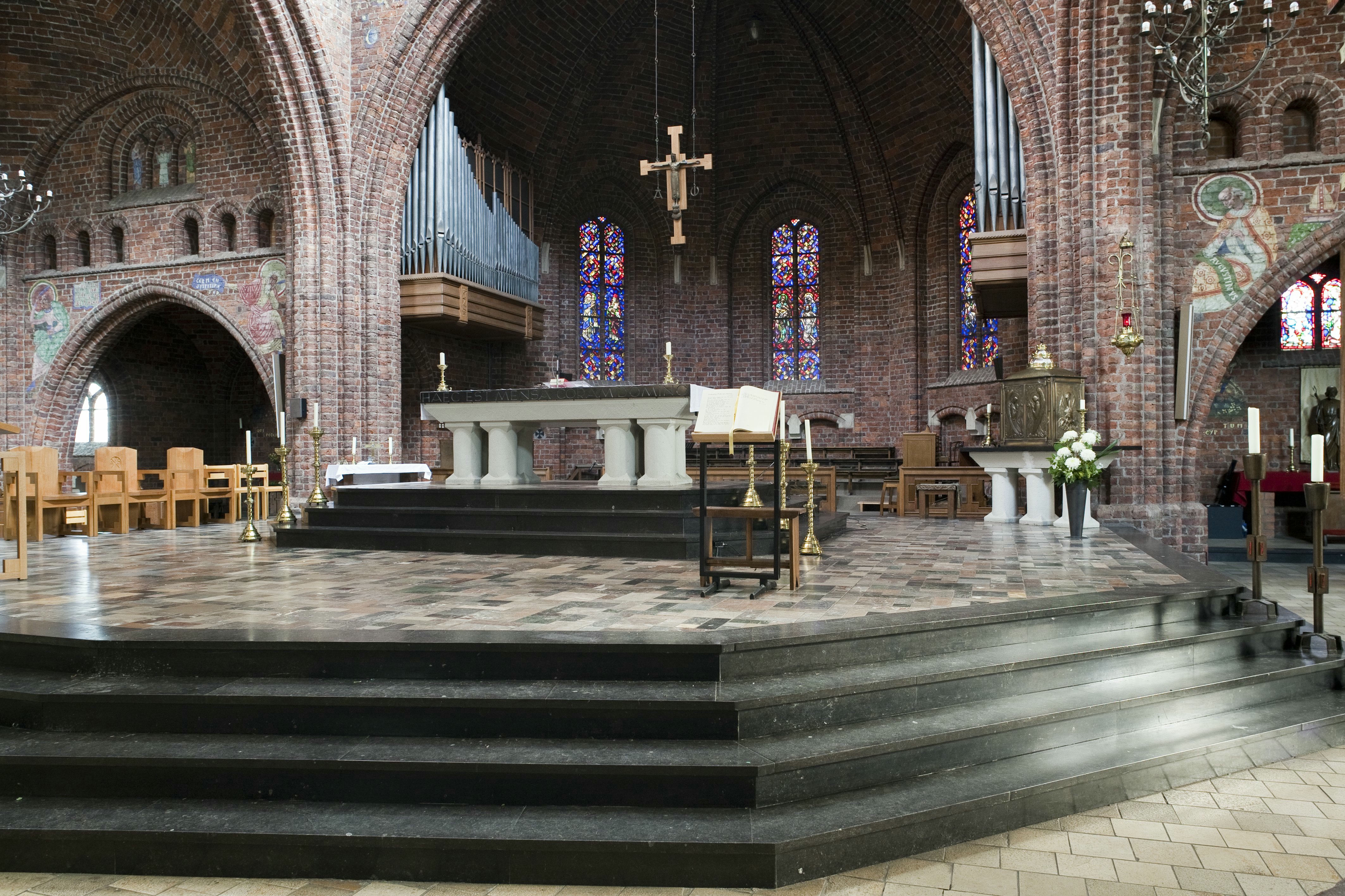 O.L. Vrouw ten Hemelopneming: Interieur, altaar, orgel in het koor